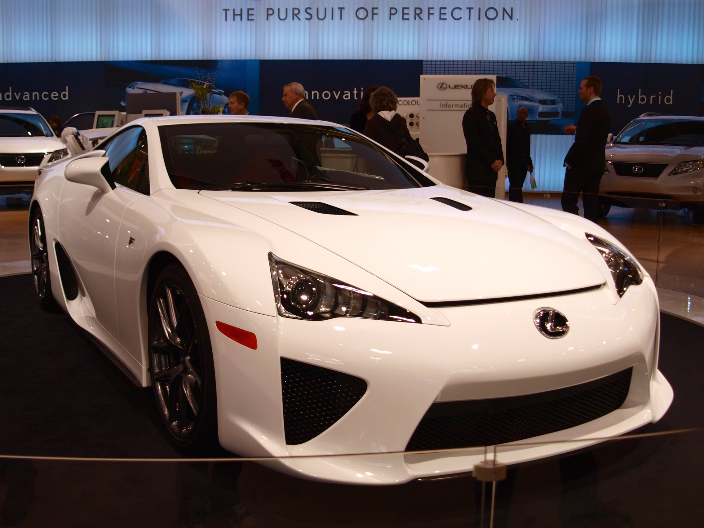 2011 Lexus LFA